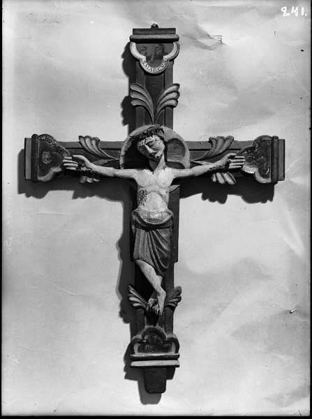 Processionskrucifix (altar) krucifix, av snidat och polykromt trä. Norskt eller norskinspirerat arbete. Ommålat på 1600-1700-talet. Restaurerat år 1918. Omkring 1250. Kategori: (05) KrucifixProcessionskrucifix (altar) krucifix, av snidat och polykromt trä. Norskt eller norskinspirerat arbete. Ommålat på 1600-1700-talet. Restaurerat år 1918. Omkring 1250.